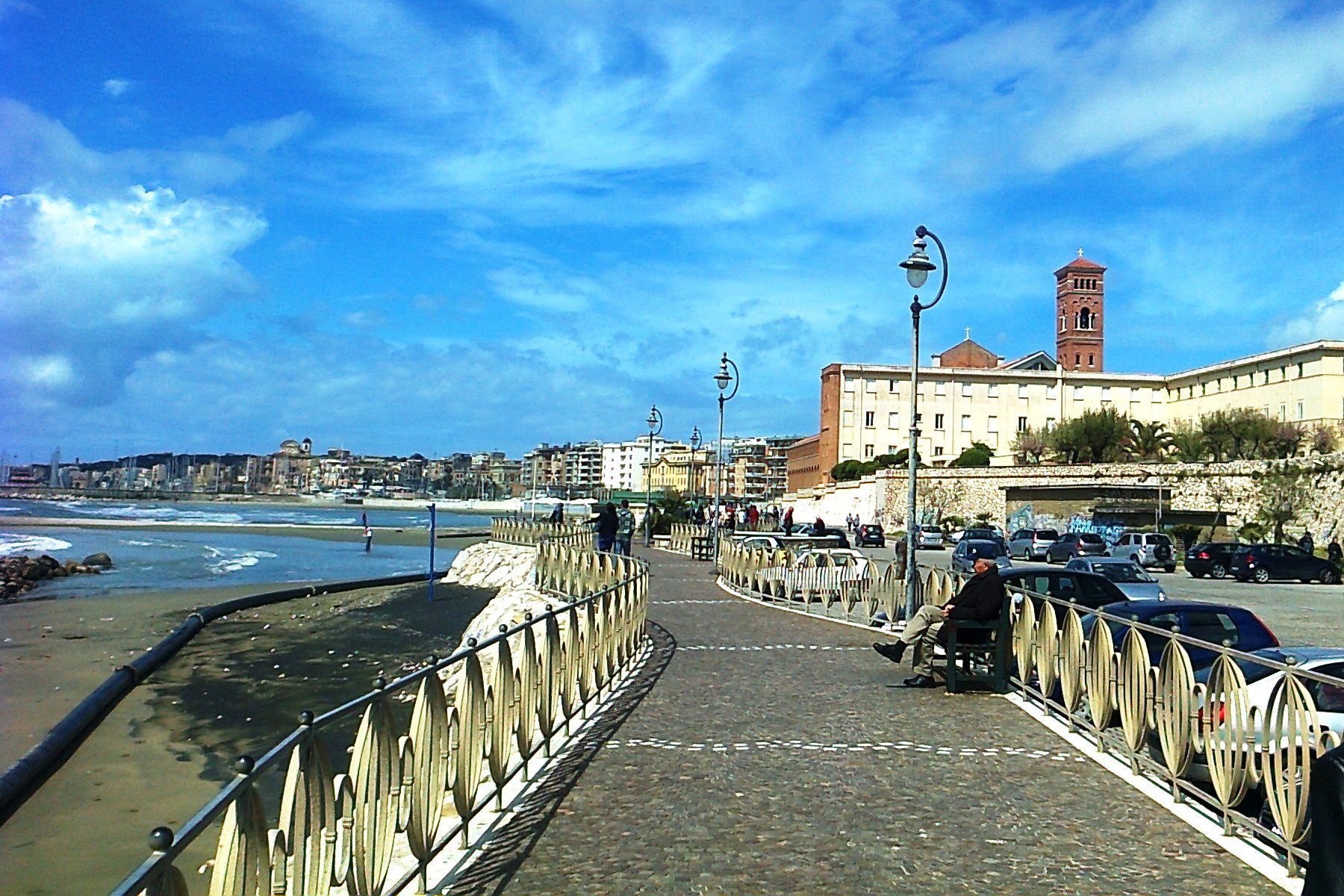 Nettuno 2012-04-15